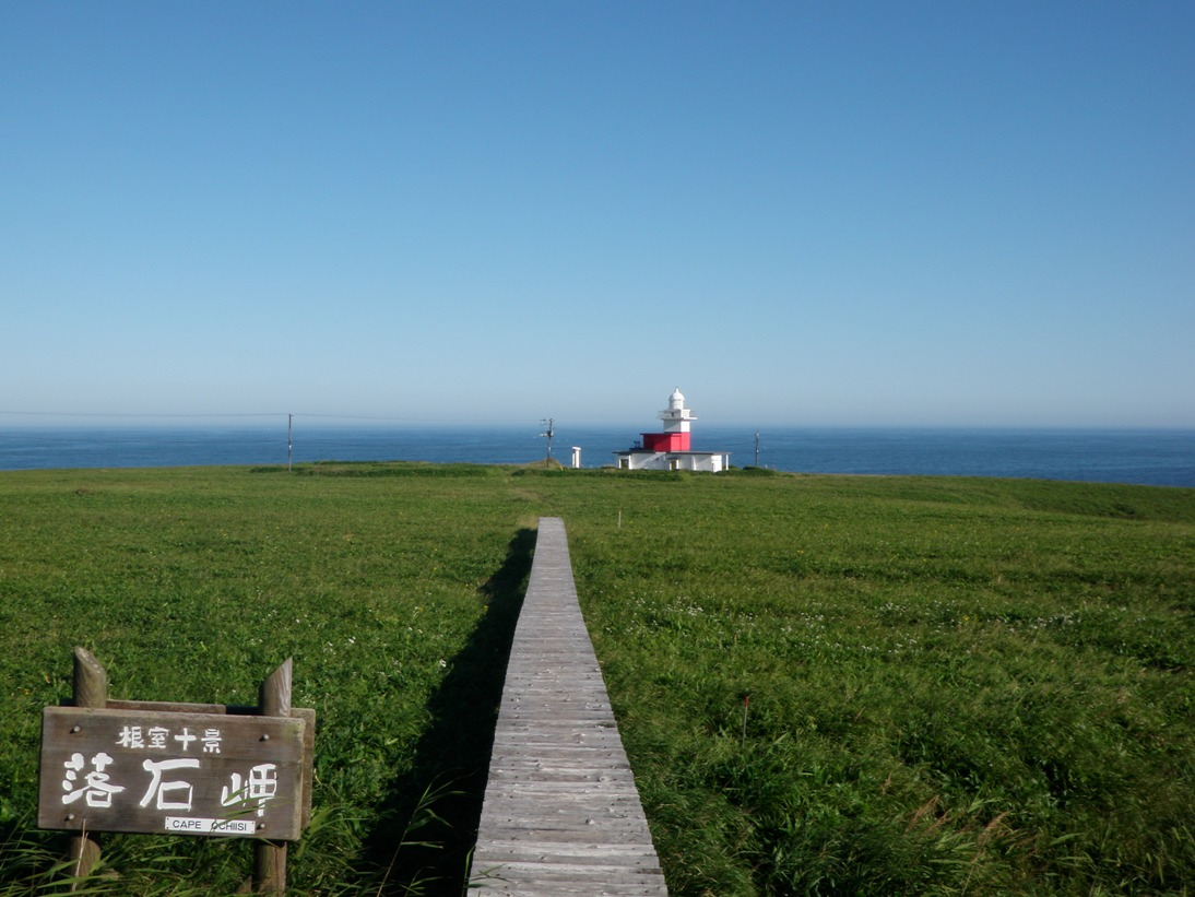 北海道根室市の落石岬